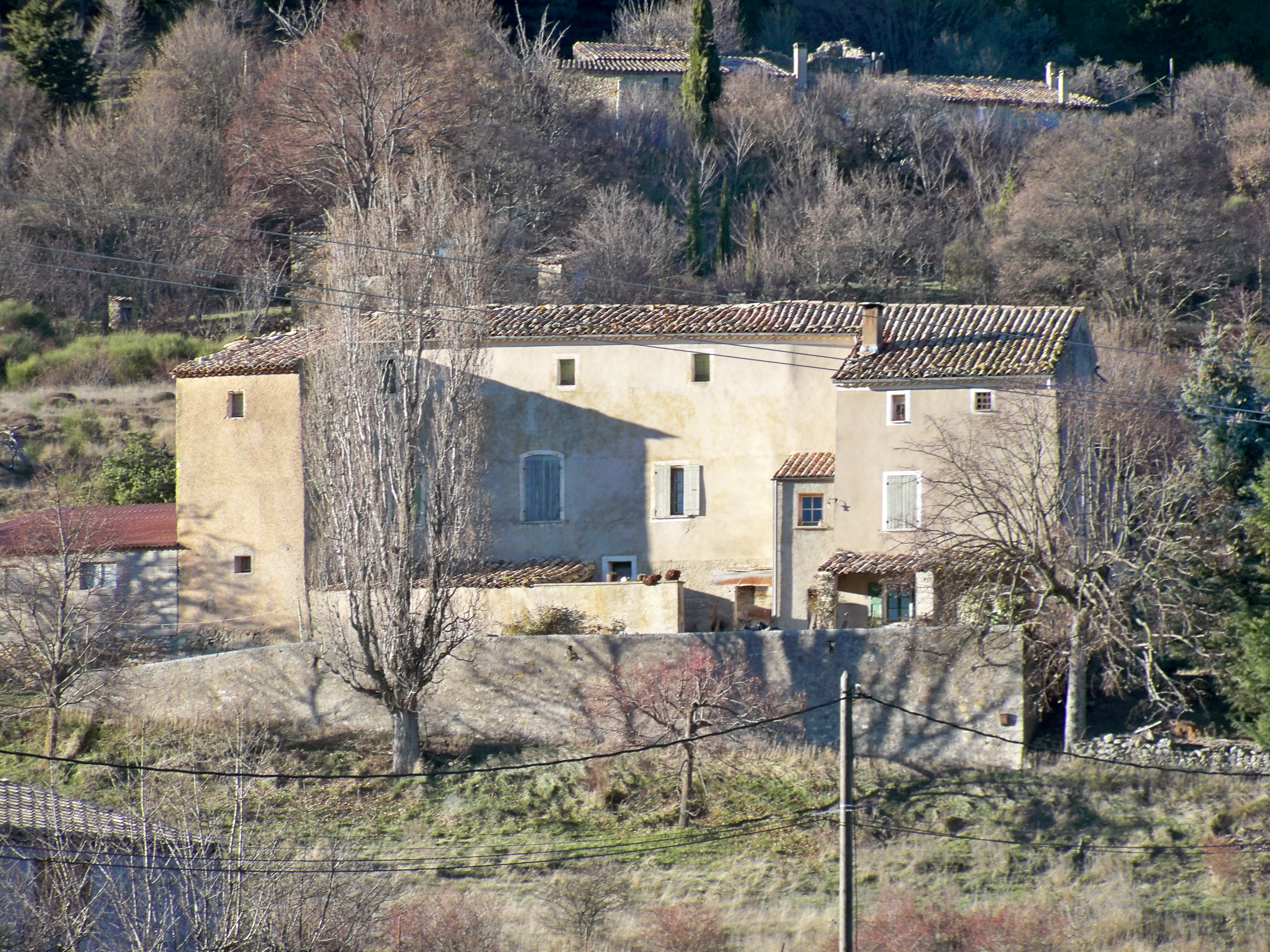 Moaison à cour à Aurel, Vaucluse, France